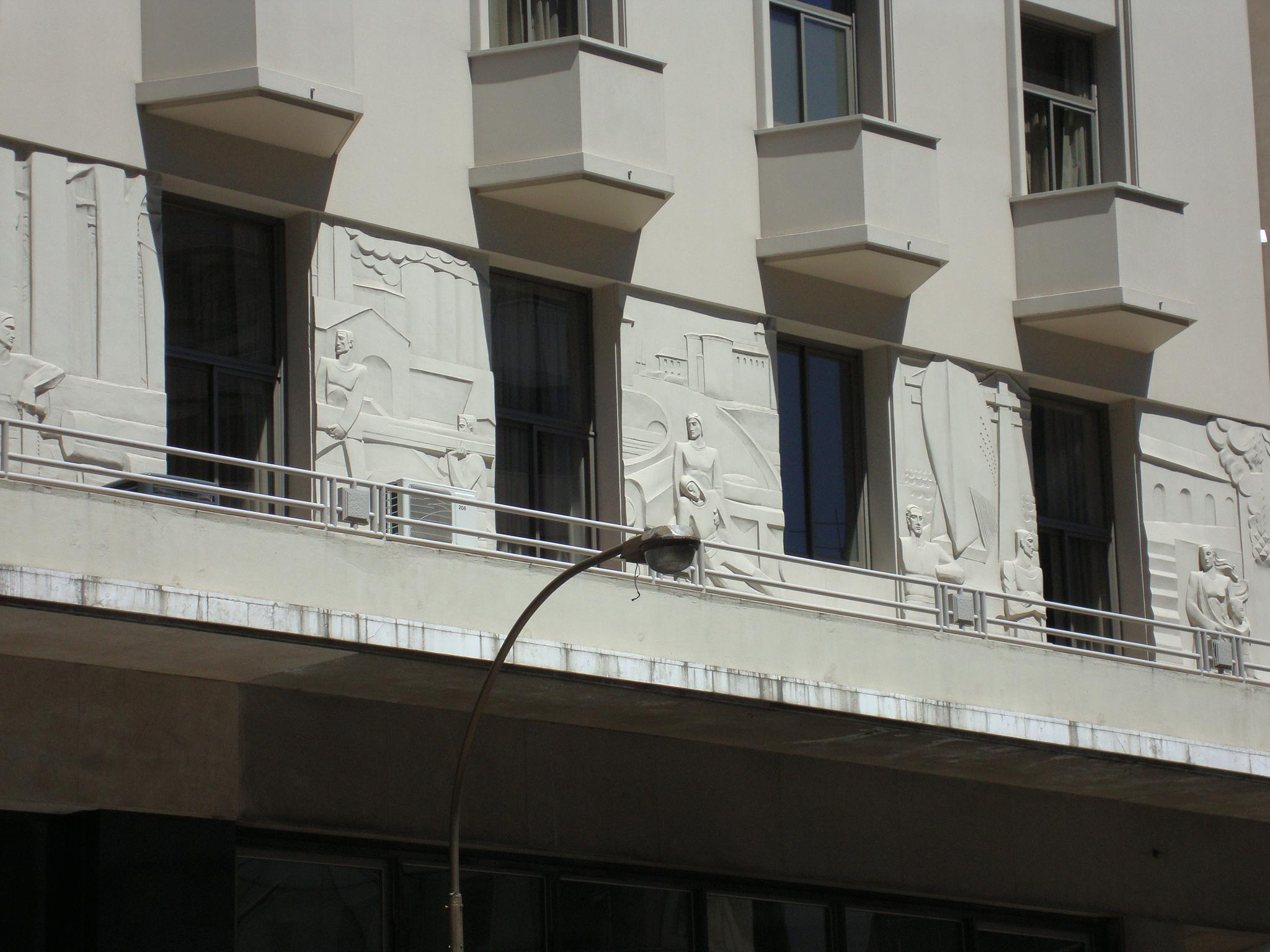 Relieves en la fachada del Hotel Reconquista Luxor, inaugurado en 2009. Antes, sede del Instituto Ítalo Argentino de Seguros Generales. Av. Presidente Roque Sáenz Peña (Diagonal Norte) 890. Buenos Aires, Argentina.